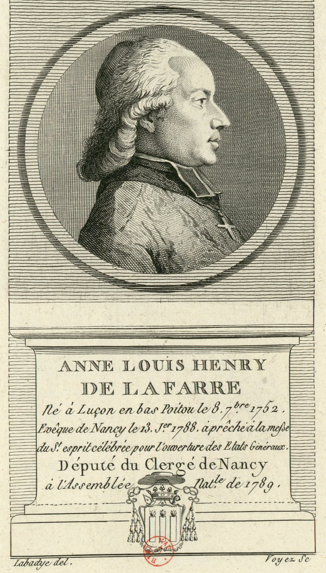 Anne-Louis-Henri de La Fare : né à Luçon en Bas Poitou le 8 September 1752, évêque de Nancy le 13 January 1788, a prêché à la messe de St Esprit célébrée pour l'ouverture des Etats Généraux. Député du clergé de Nancy à l'Assemblée nationale de 1789